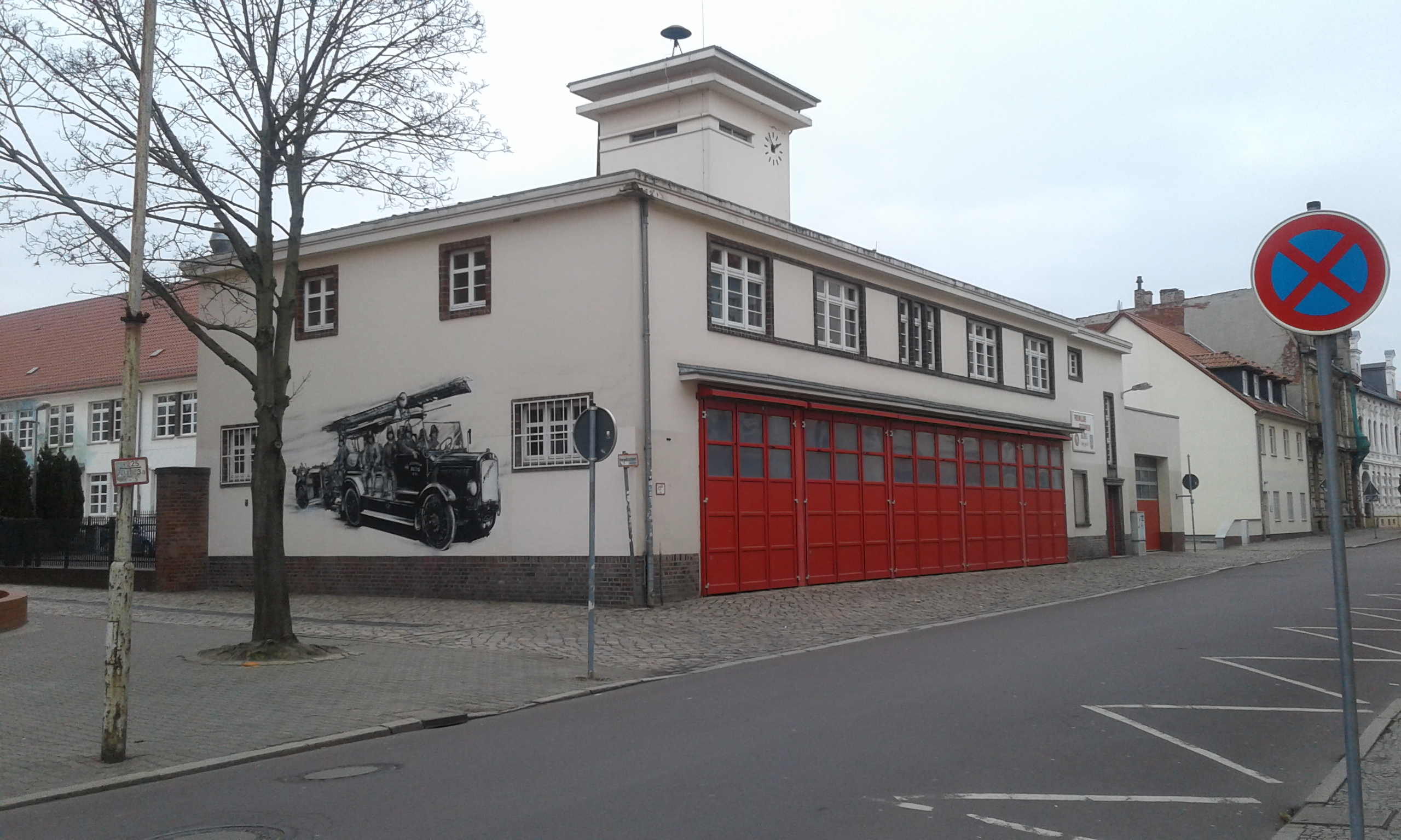 Feuerwehr